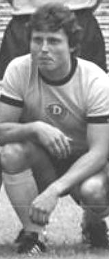 Frank Richter, Dynamo Dresden, 1980